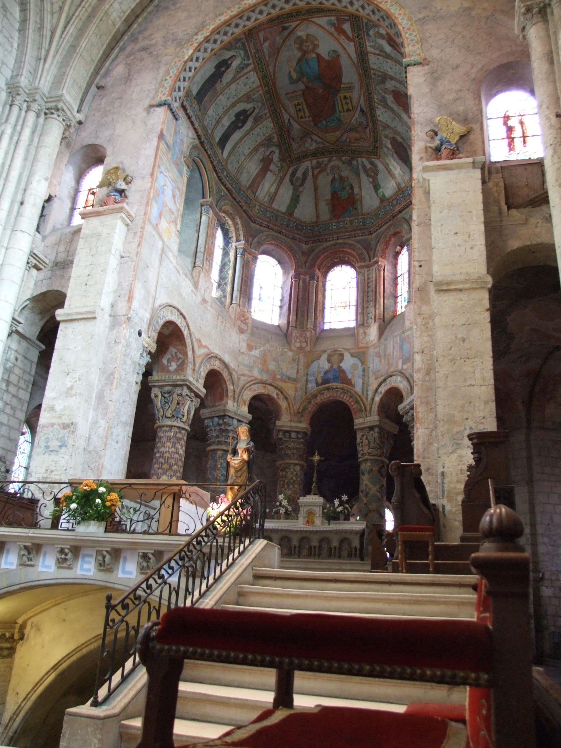 Église Sainte-Radegonde, Poitiers, Poitou-Charentes, FRANCE